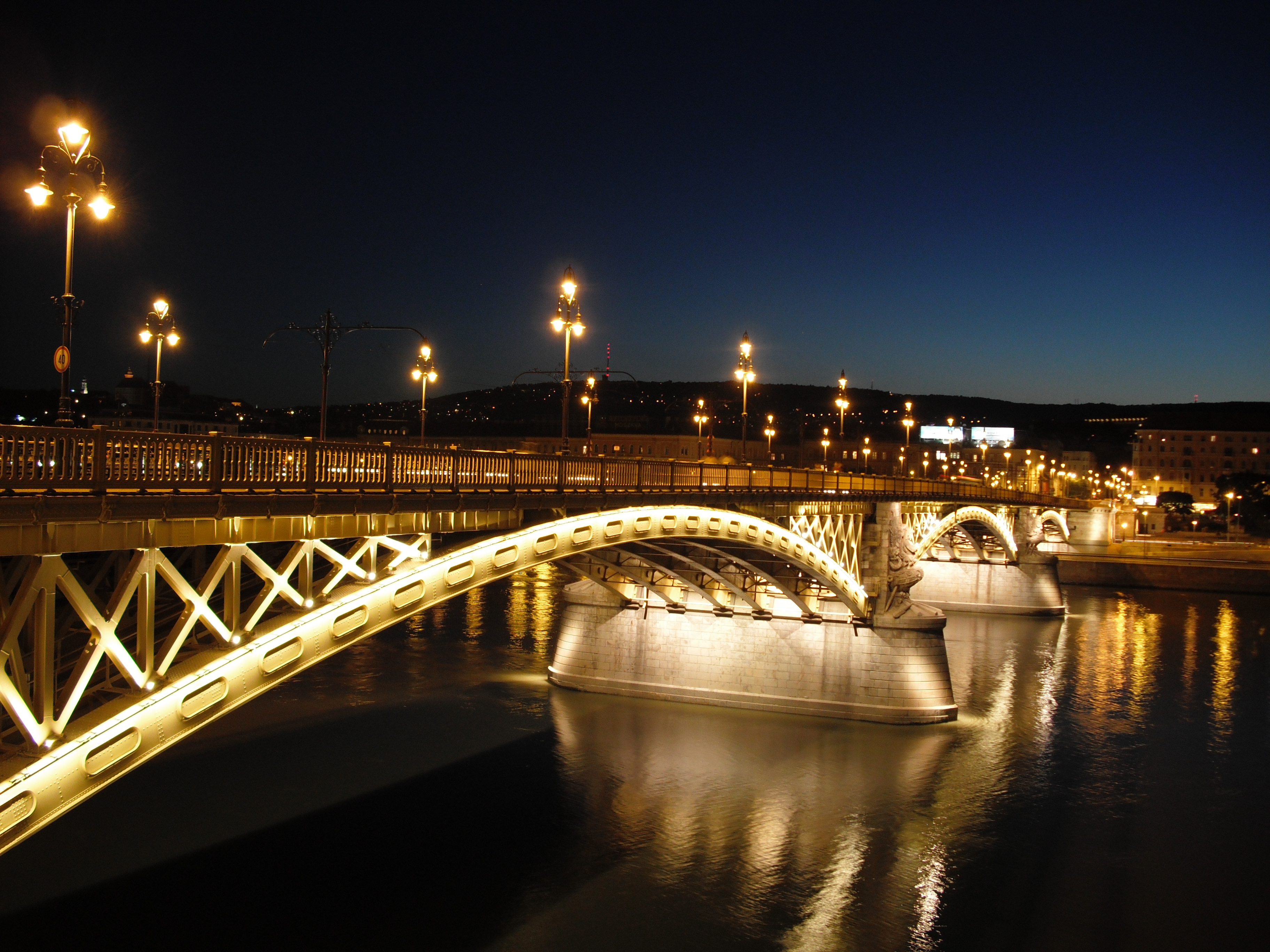 Margit híd This is a photo of a monument in Hungary. Identifier: 524